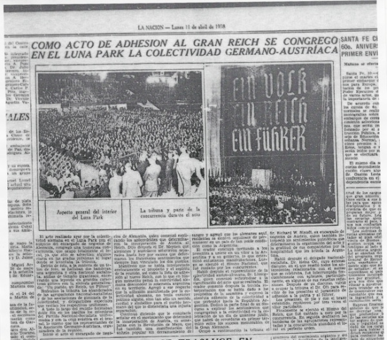 Artículo del diario La Nación que informa sobre un acto en celebración del Anschluss organizado por simpatizantes nazis en el Luna Park en Buenos Aires el 10 de abril de 1938.